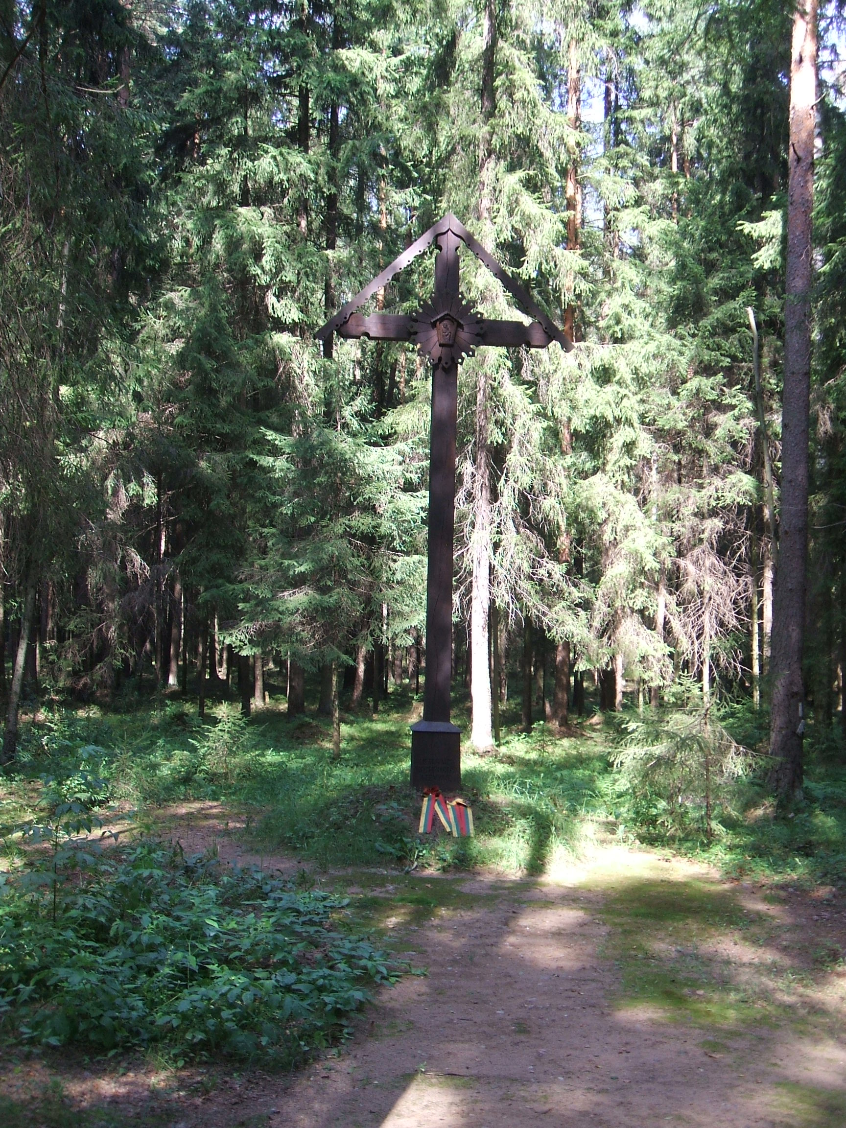 Памятники Левашовской пустоши